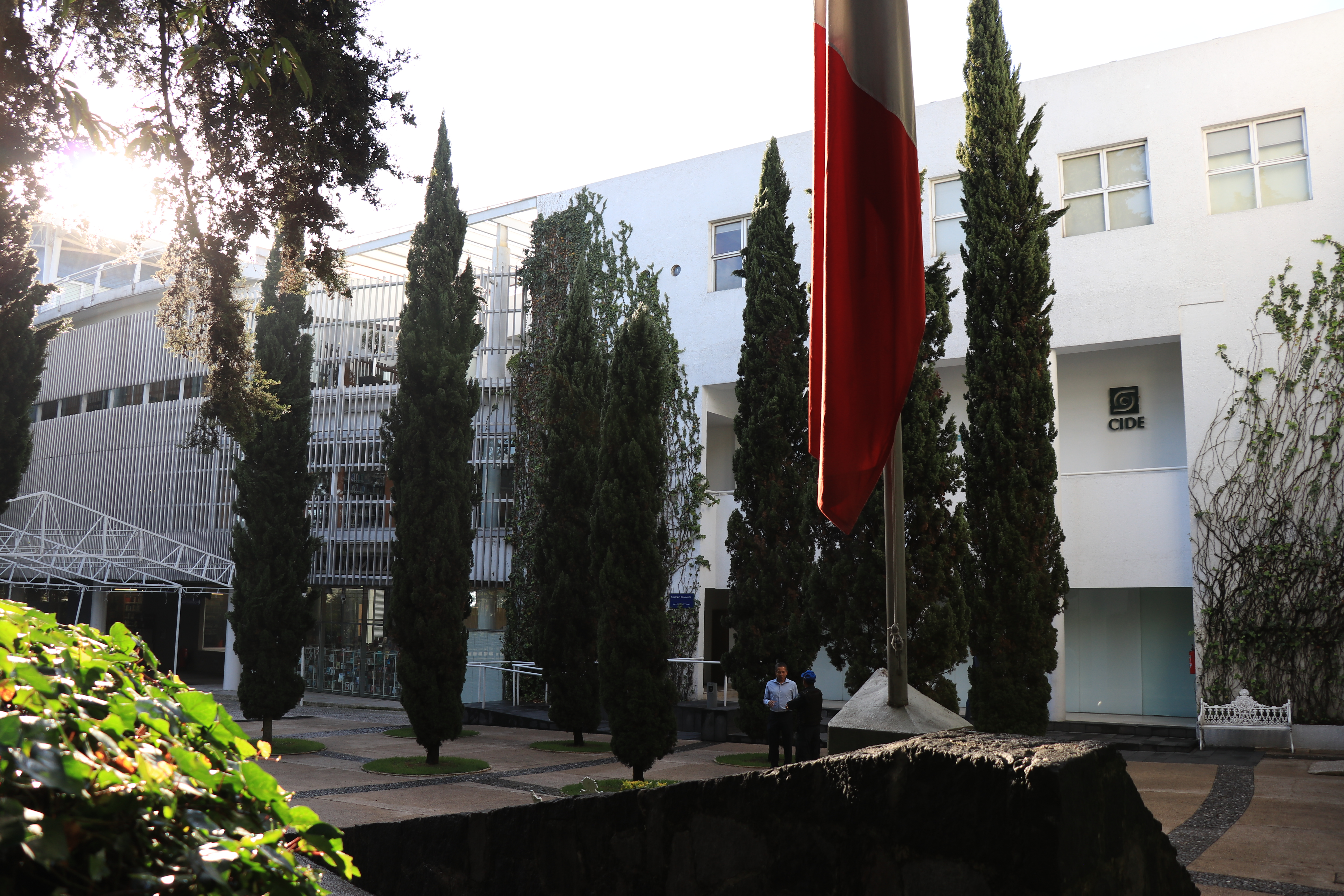 Instalaciones del CIDE. 12 de agosto de 2019